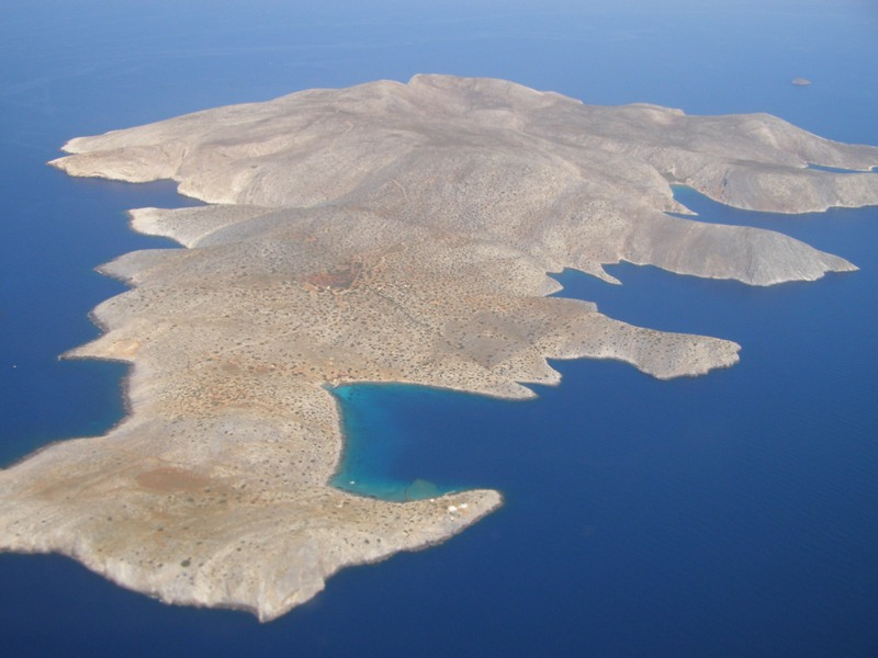 Luftbild der Insel Dia